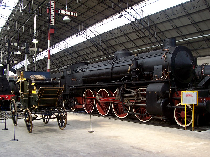 Milano - Padiglione Ferroviario al Museo della Scienza e della Tecnica "Leonardo da Vinci"